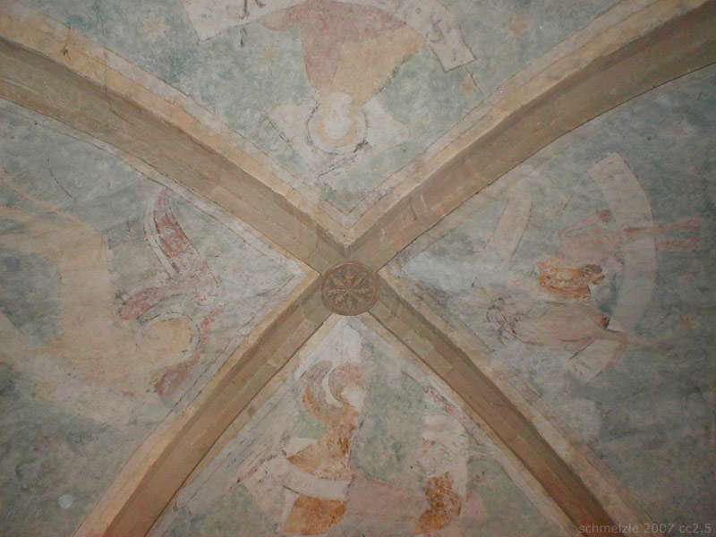 Deckenmalerei um 1250 im Chorgewölbe der Bergkirche in Bad Rappenau-Heinsheim, Baden-Württemberg, Deutschland